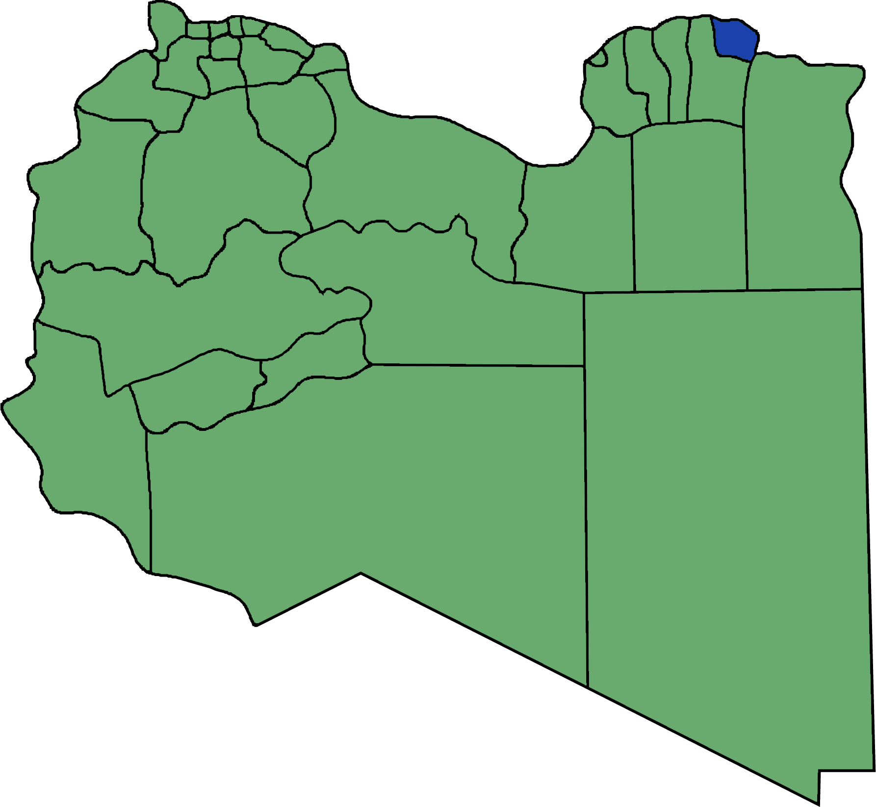 Die neuen Gemeinden (Munizipien) in Libyen. Darnah hervorgehoben.